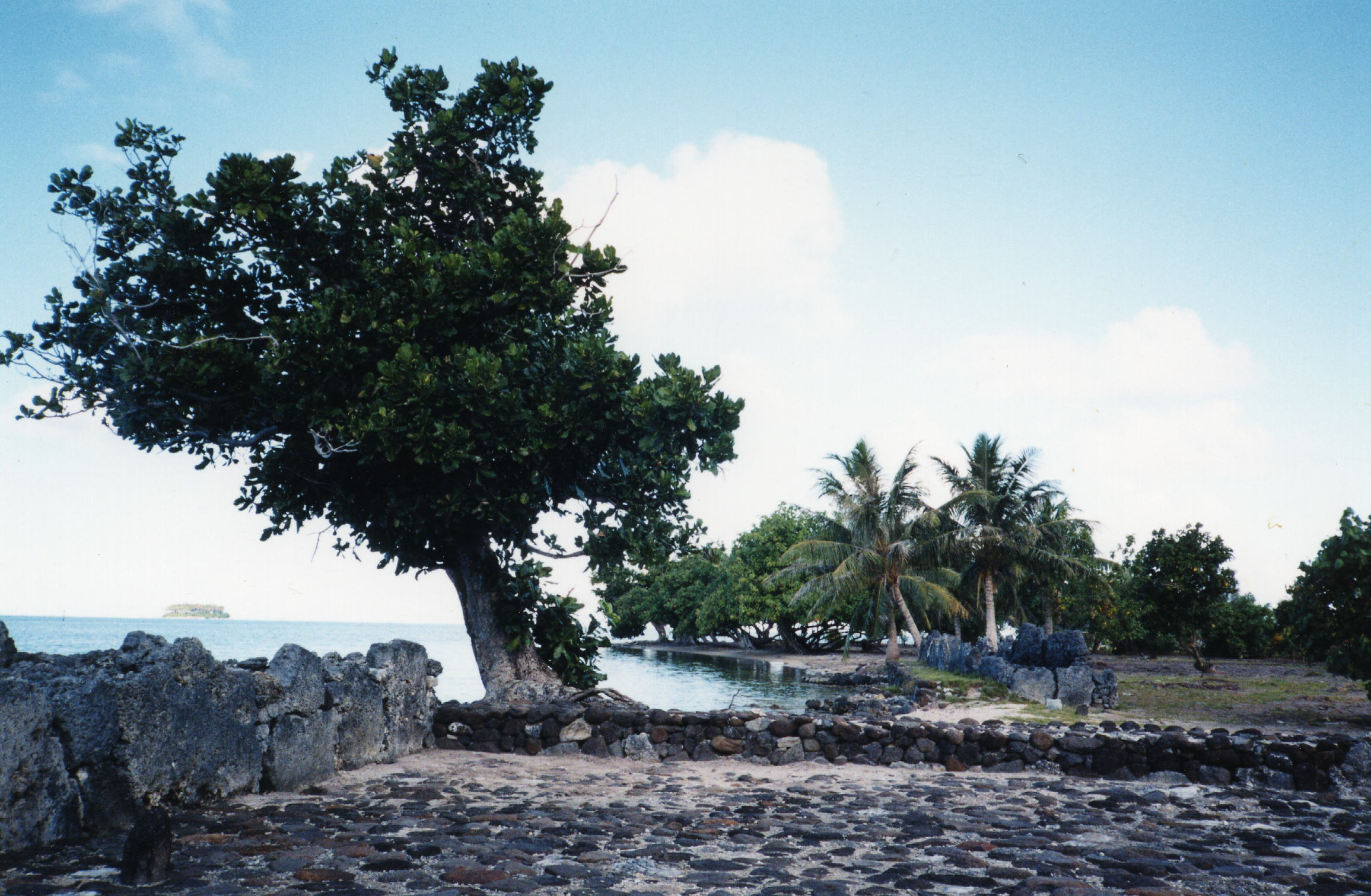 Marae sur l'île de Raiatea (Polynésie française)